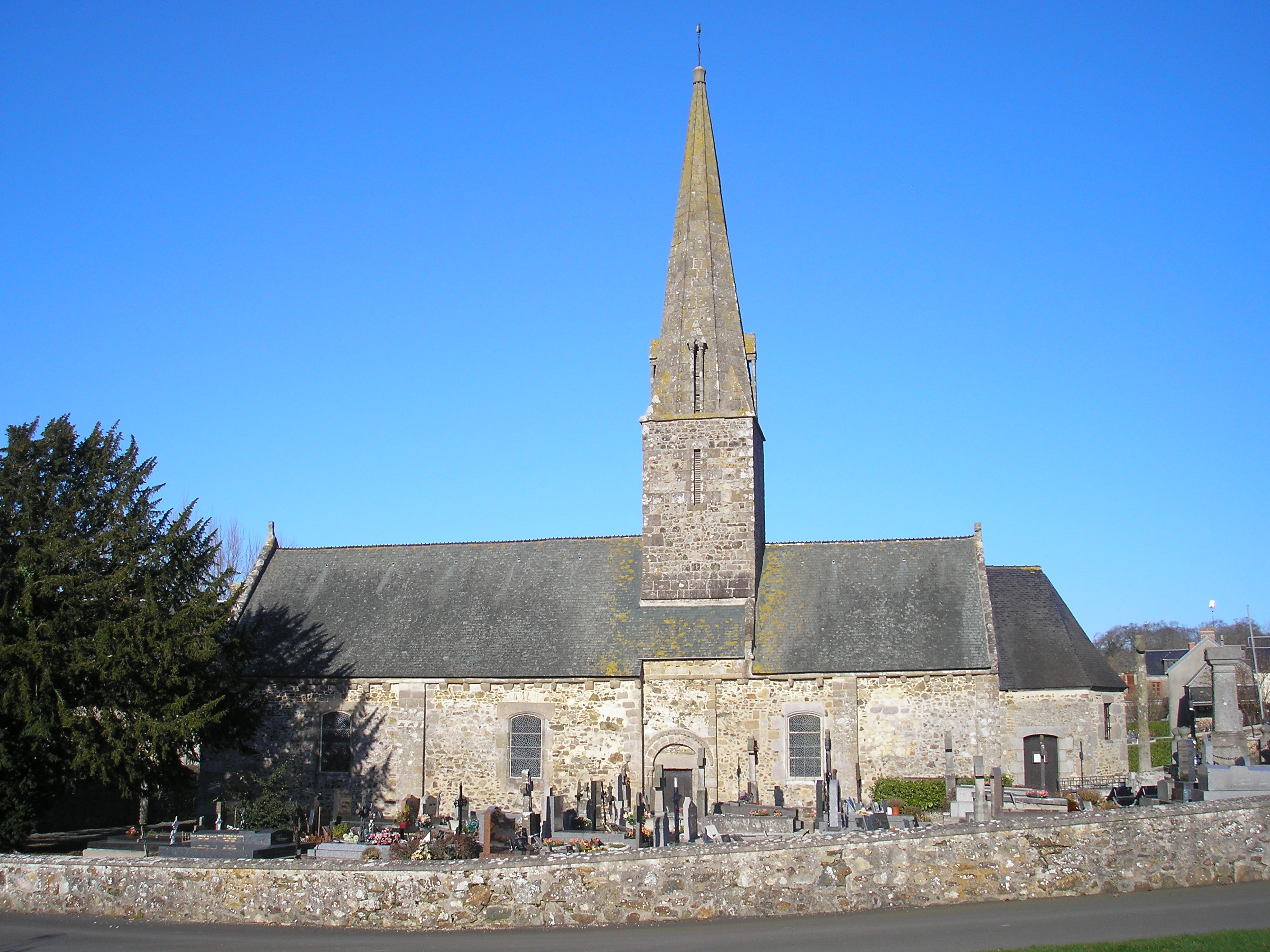 Bréville-sur-Mer (Normandie, France). L'église Notre-Dame.